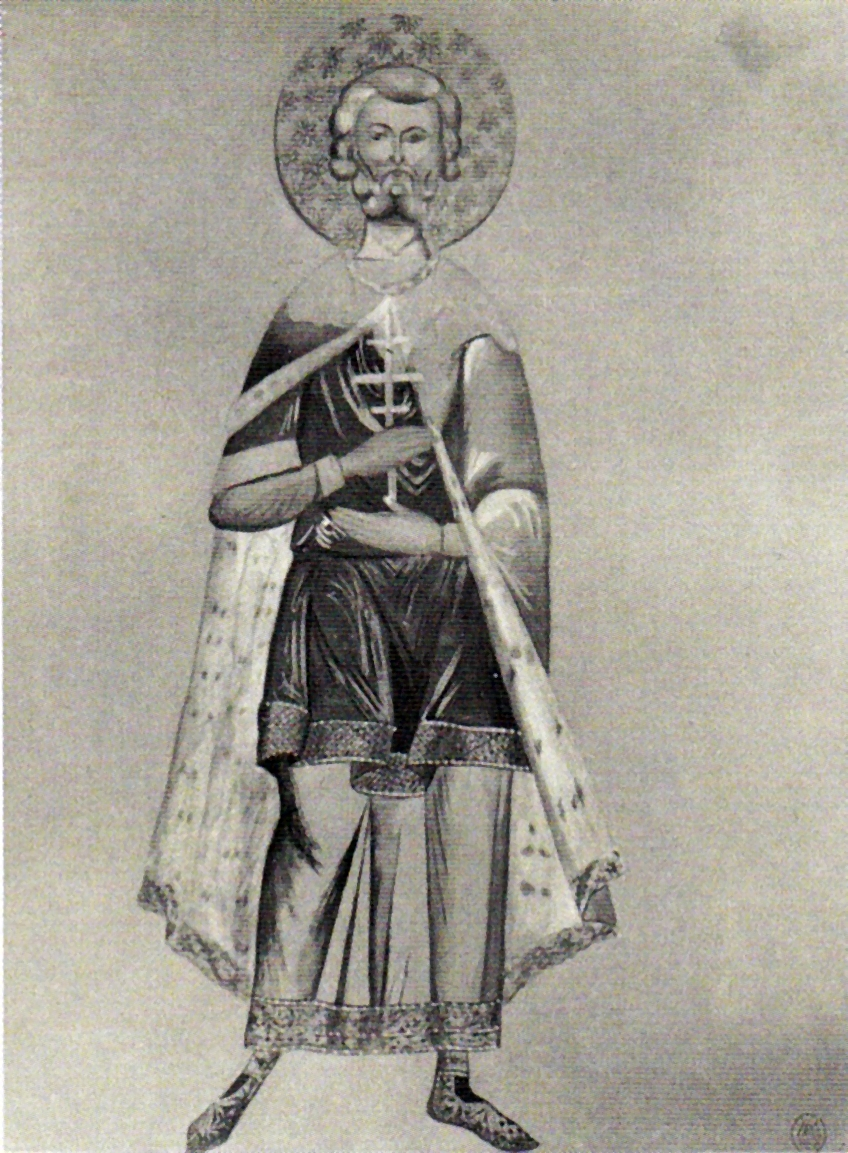 Sfantul Eustatie